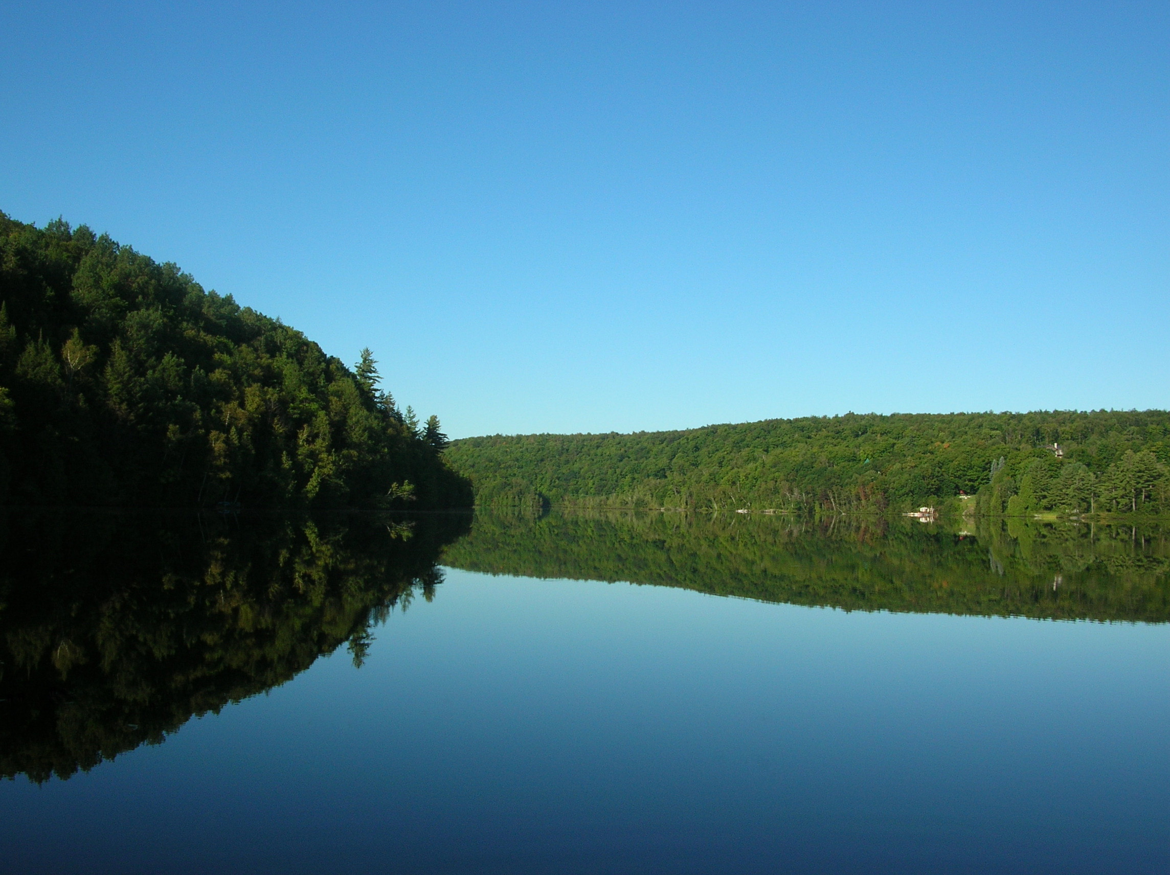 Lac Rocher depuis le Nord-Ouest (Sainte-Mélanie, Québec)